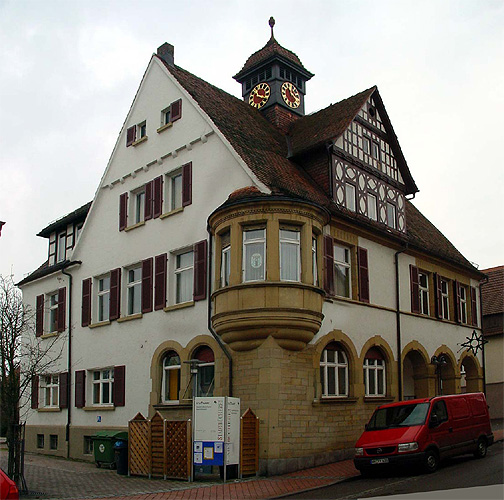 Ratahus mit ehemaliger Polizeiwache Stuttgart-Stammheim. Autor: Foo'bar Kategorie:Stuttgart